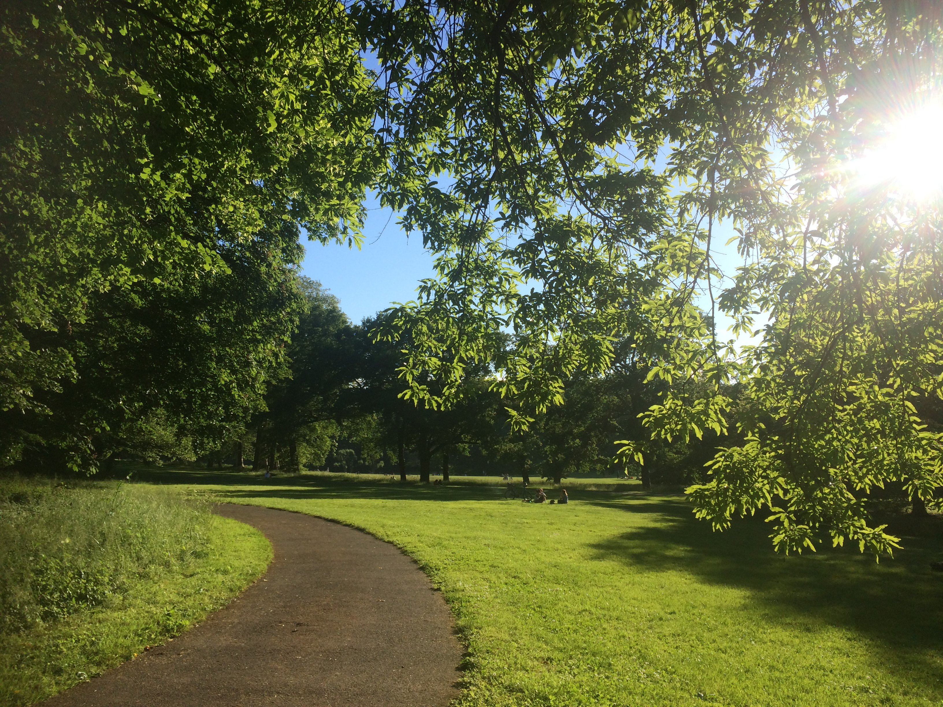 Parc la grange 2019